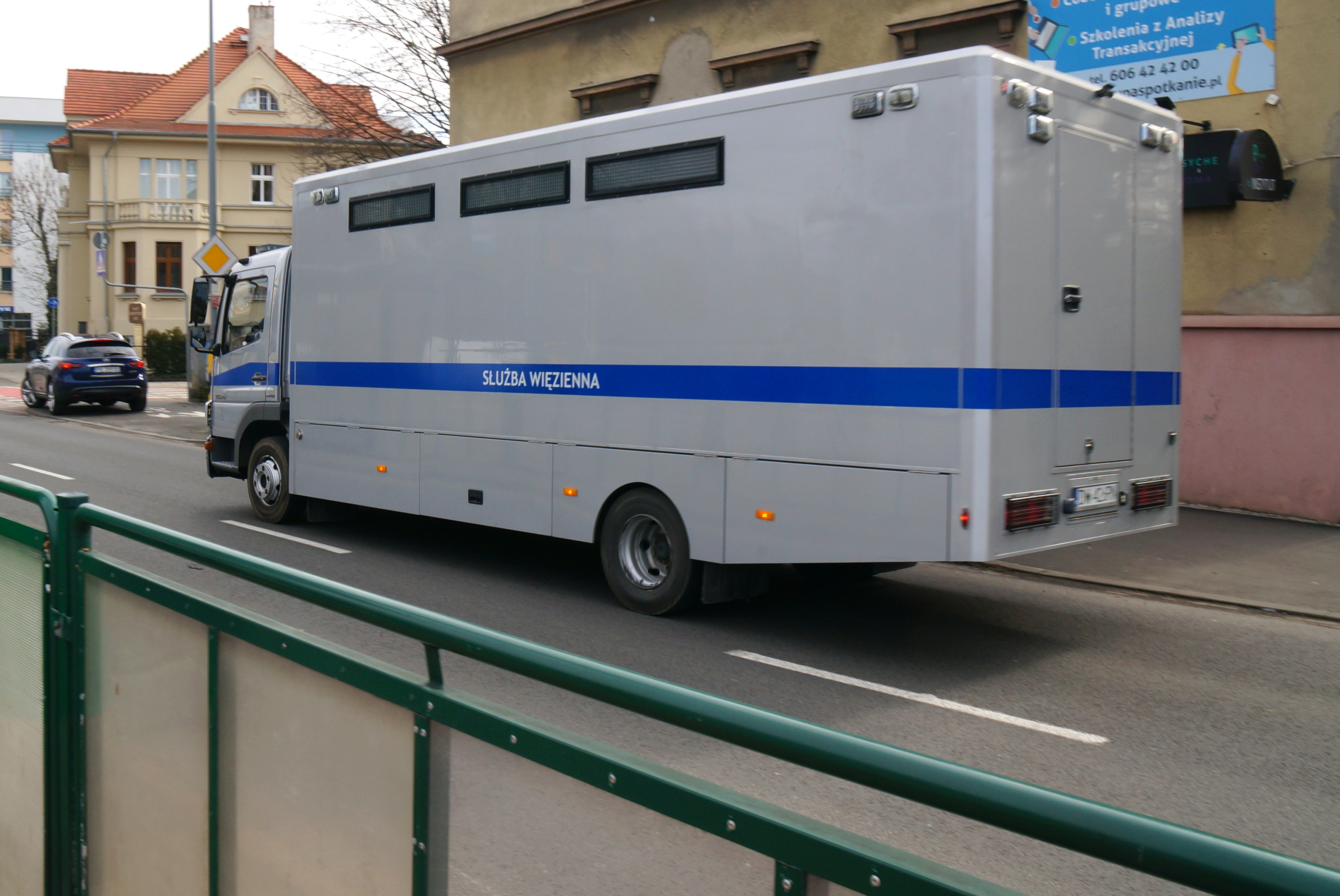 MB_Atego pojazd specjalny Służby Więziennej, zbudowany przez AMZ Kutno